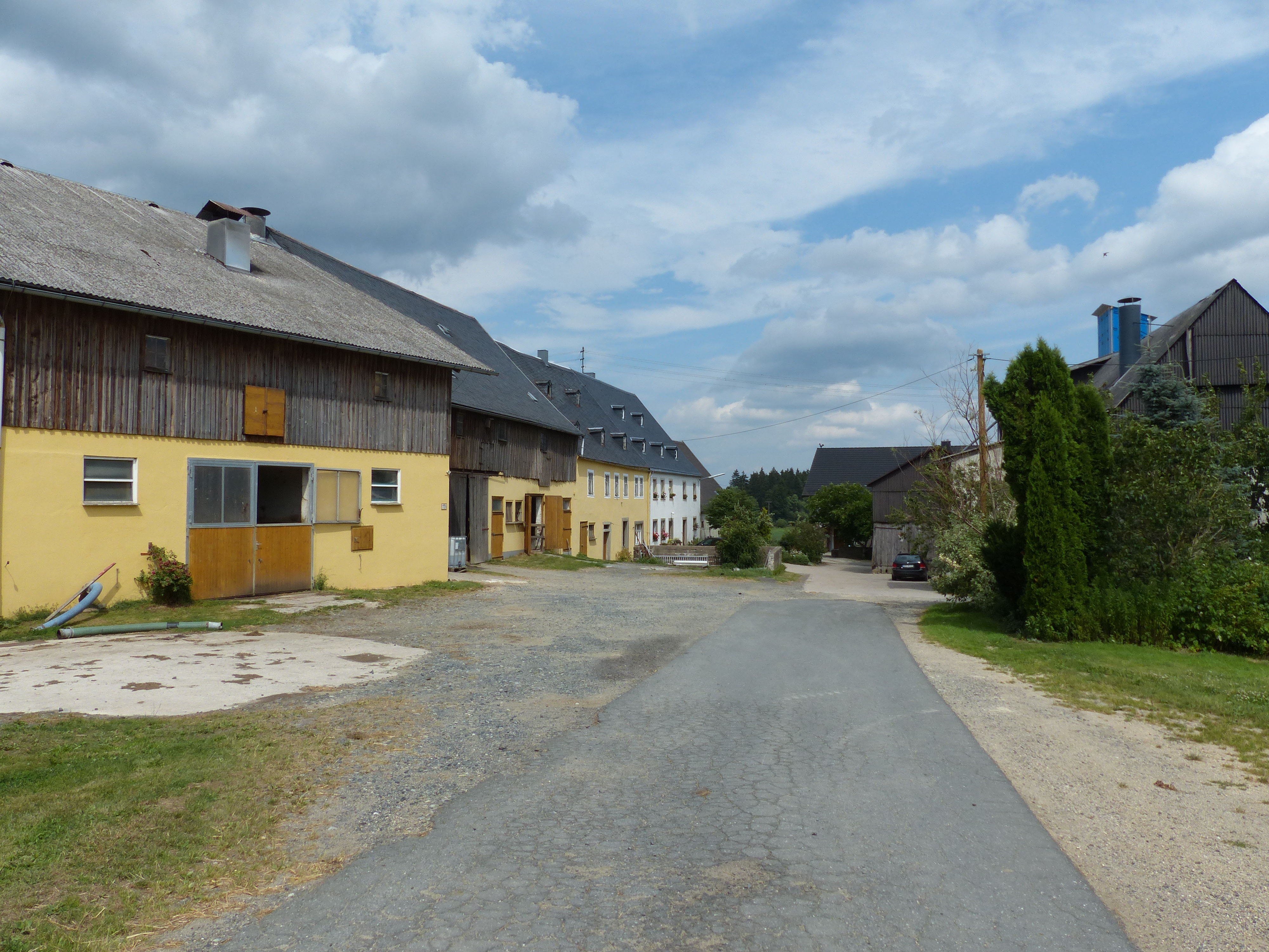 Bauwerk in der Stadt Weißenstadt